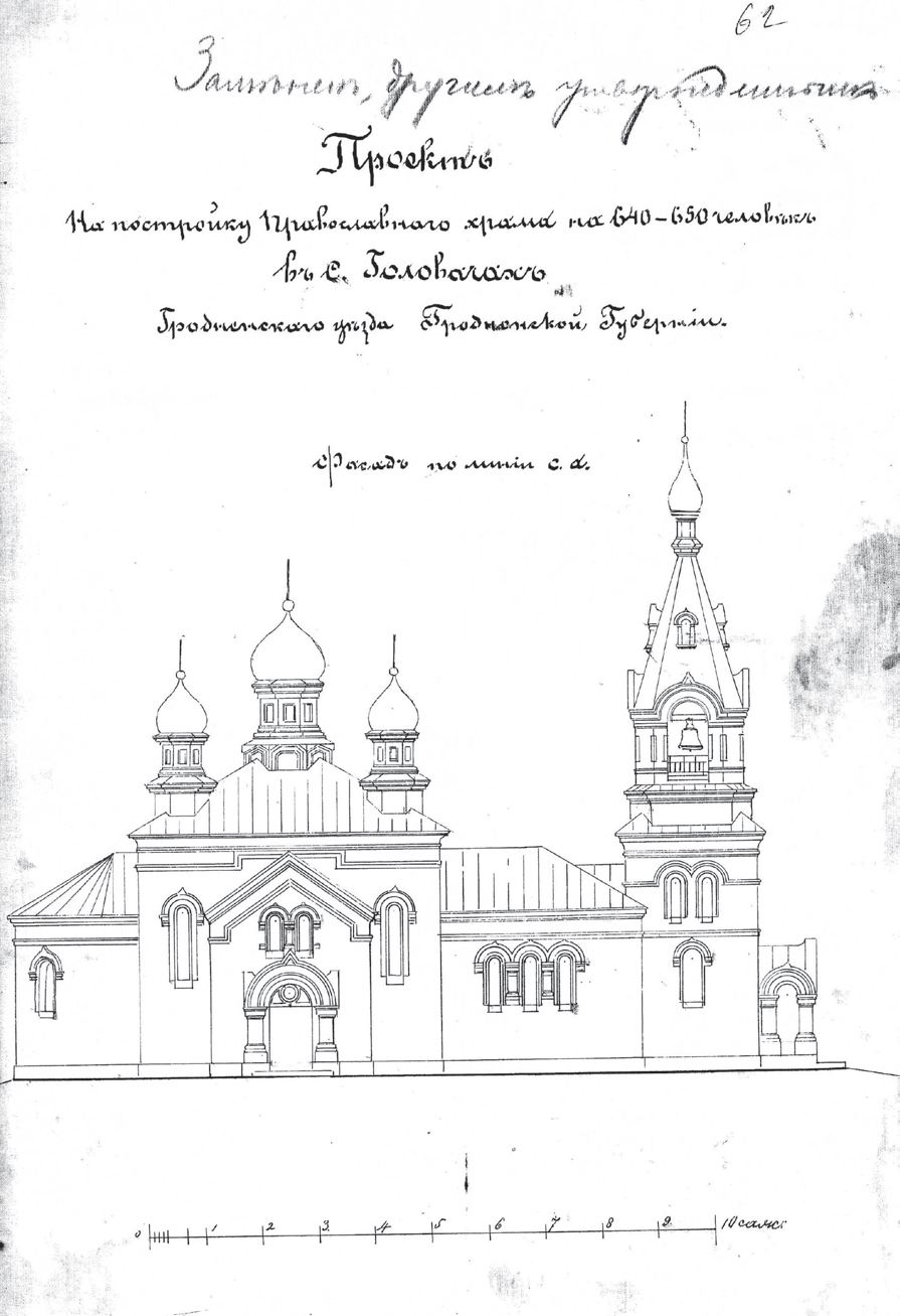 Беларуская (тарашкевіца): Галавачы (Hałavačy). Царква-мураўёўка